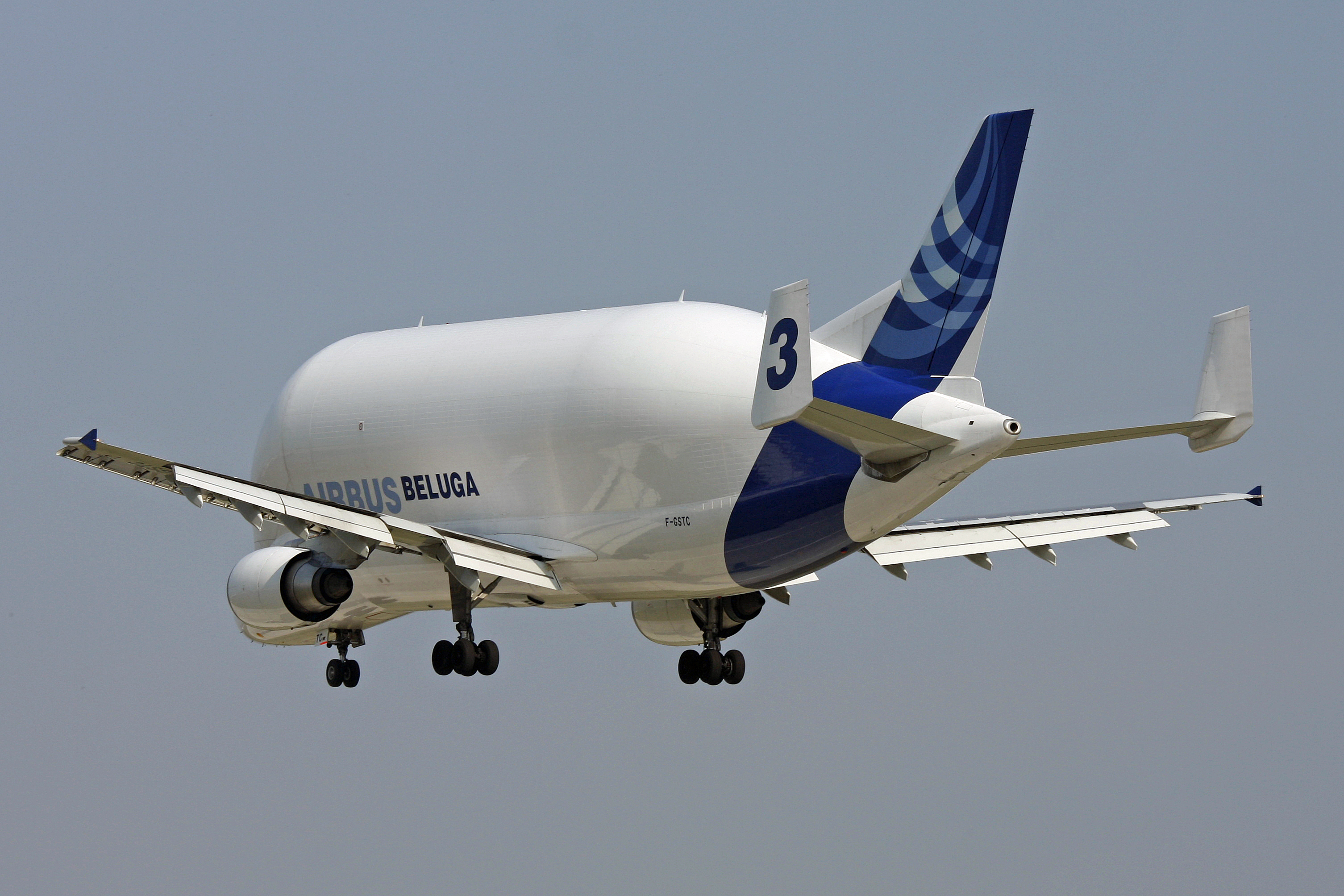 14-04-09 Airbusplant Finkenwerder